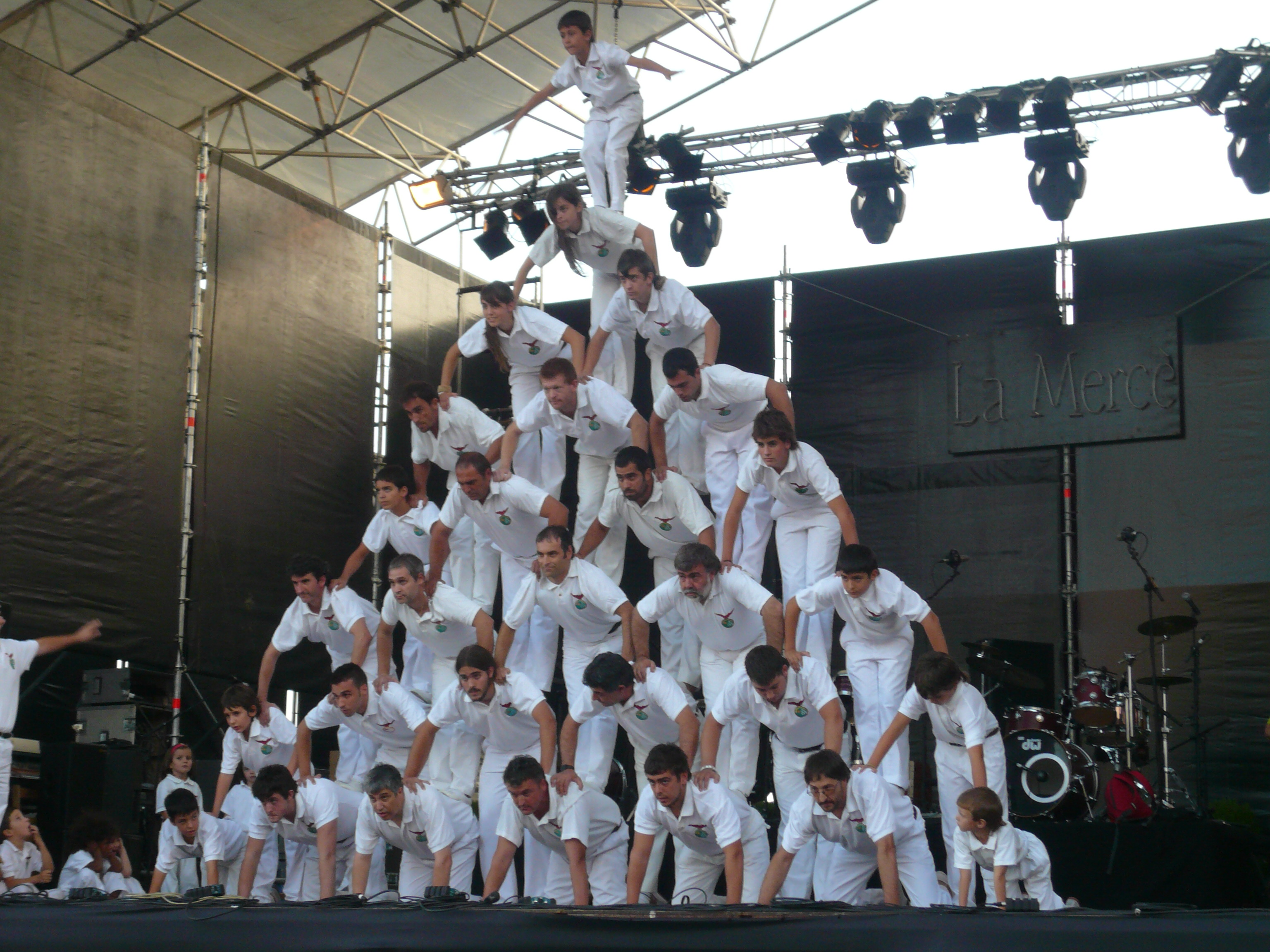 Trobada de colles de falcons de Catalunya a la Mercè del 2007. Cercavila al carrer Ferran i la Rambla i actuació al Portal de la Pau.